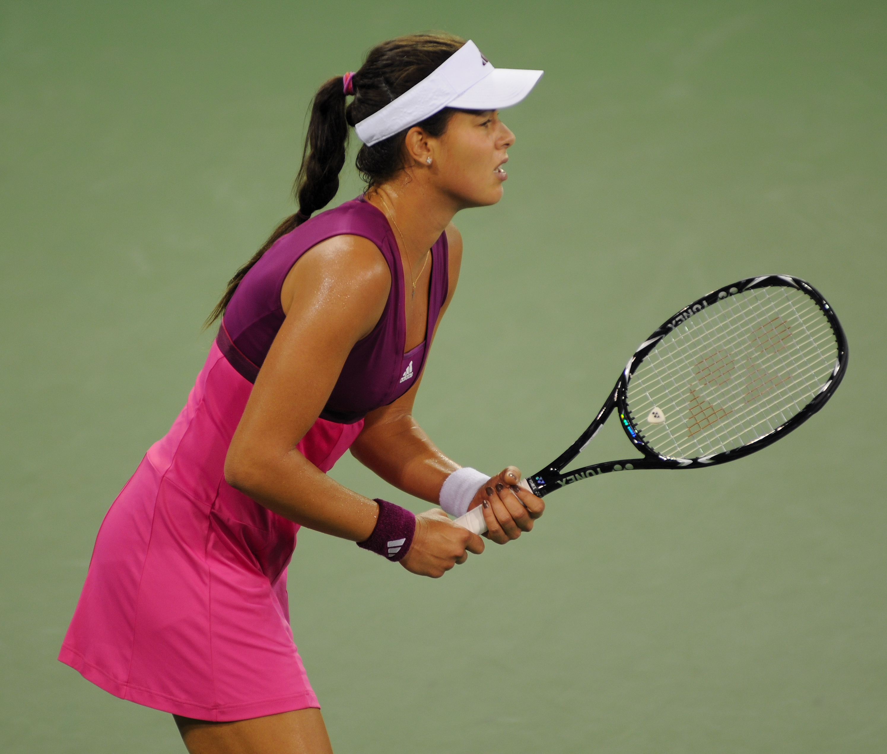 Ana Ivanovic - US Open 2010